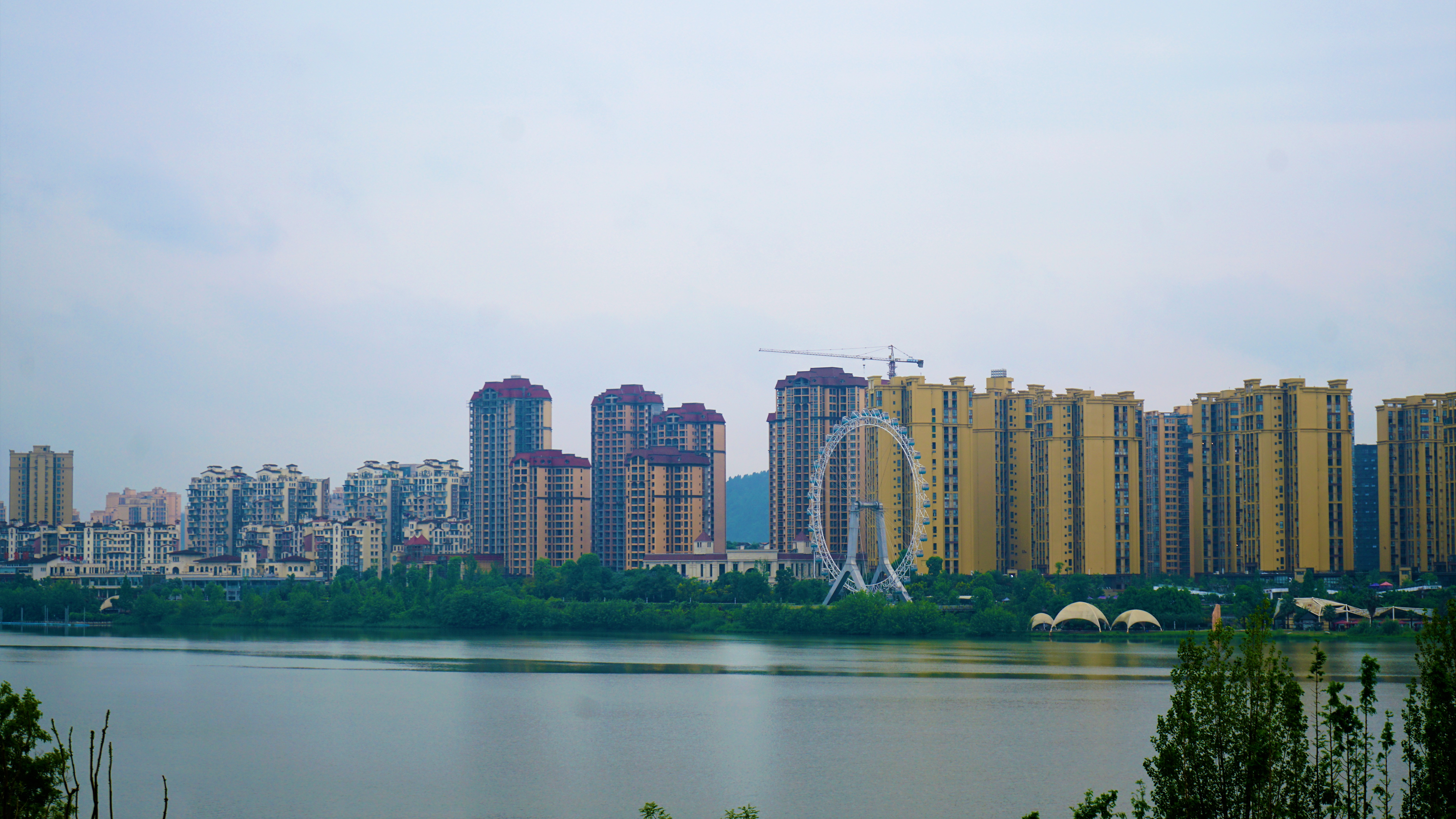 通德大桥上眺望江北